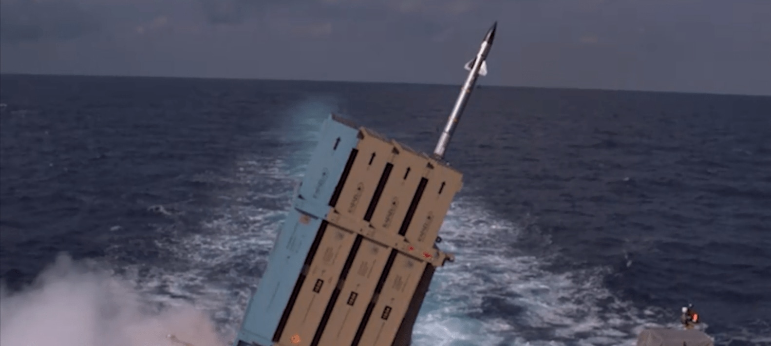 ספינת "סער 6" החדשה של זרוע הים. מטרתה להגן על אסדות הגז והמים הכלכליים של ישראל.